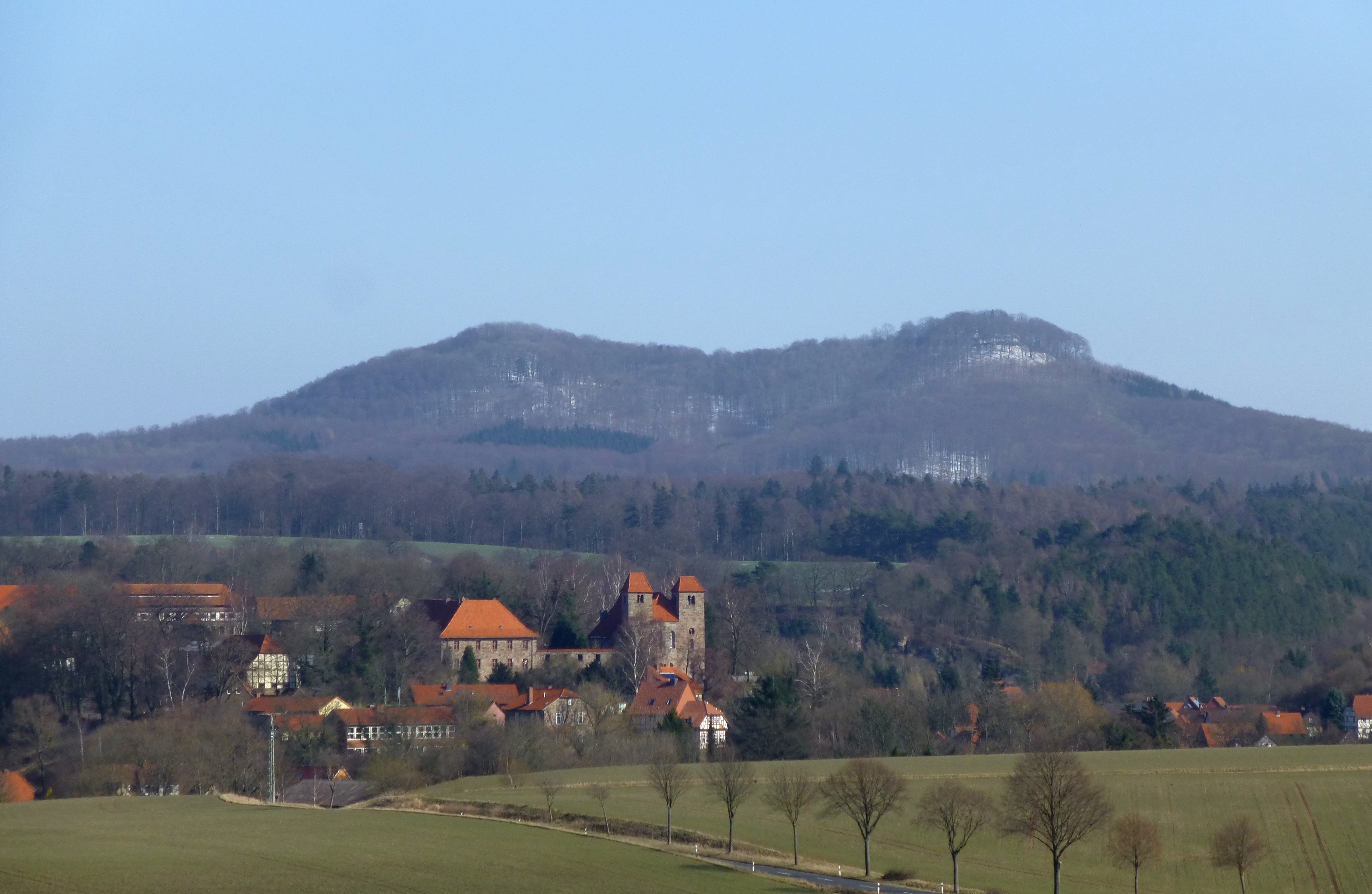 Blick von Südwesten über das Wendebachtal und den Kirchberg in Reinhausen (mit Klosterkirche und ehemaligem Klostergebäude) auf die Gleichen, Gemeinde Gleichen, Südniedersachsen